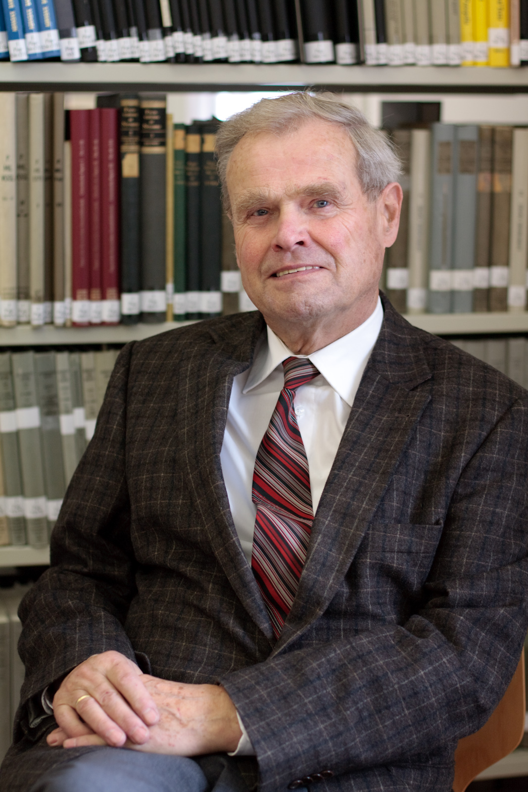 Der Altphilologe Ulrich Schindel in der Bibliothek des Göttinger Seminars für Klassische Philologie (vor dem Regal der Papyrus-Editionen).